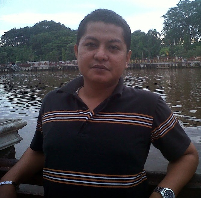 Hendri Teja penulis